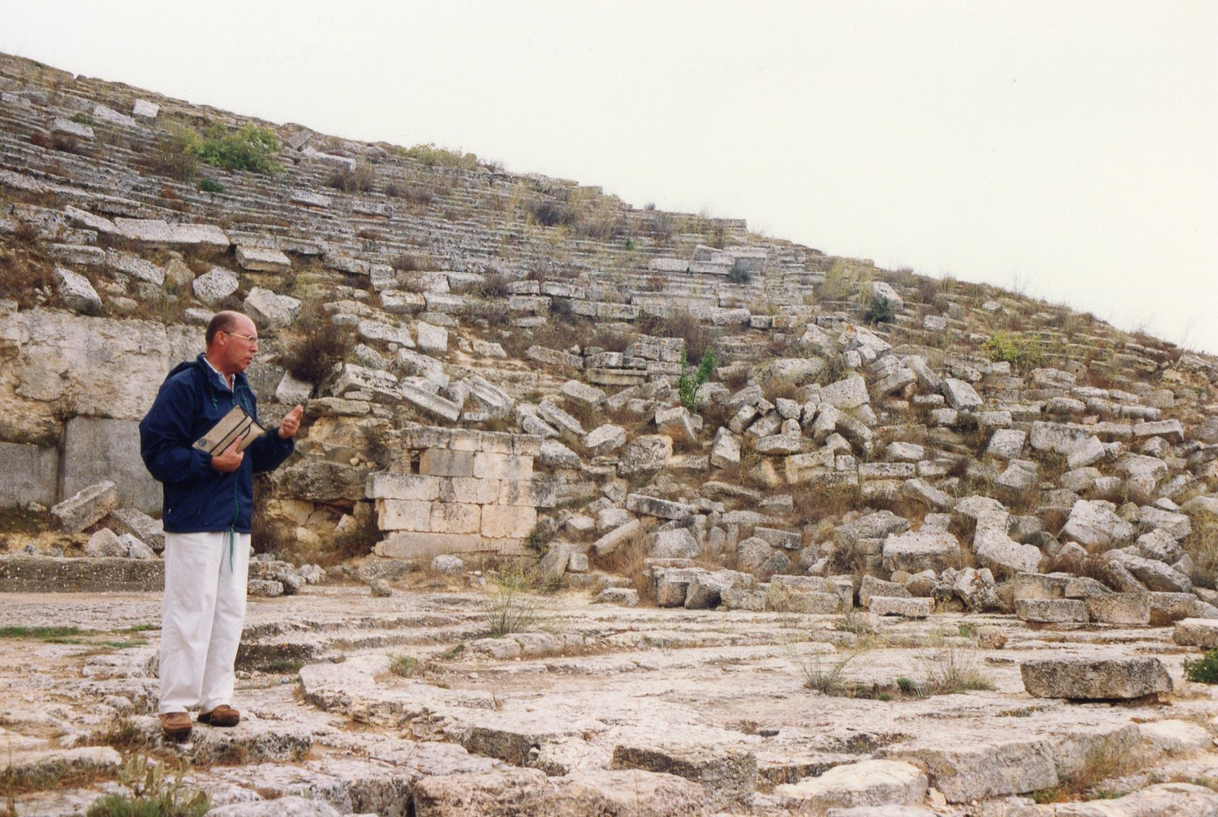 André Laronde (1940-2011), archéologue et helleniste. Photo prise à Cyrène le 21 septembre 1993, André Laronde présente le site